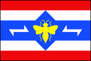 prapor obce Vlachova Lhota